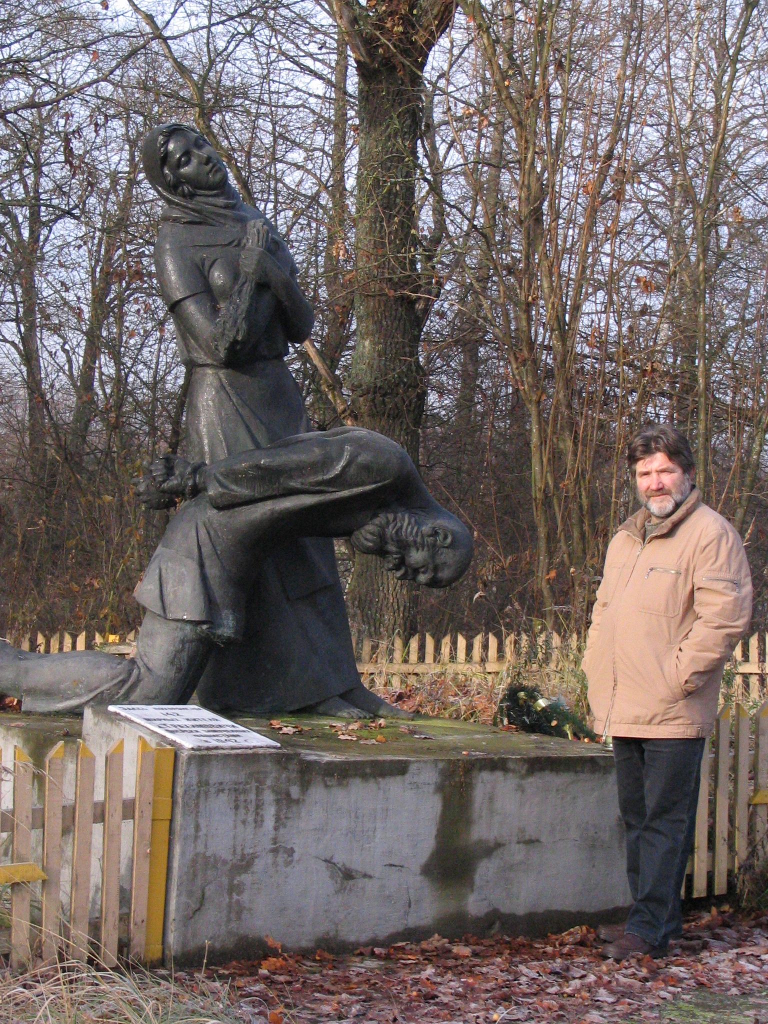 Памятник погибшим мирным жителям в годы великой отечественной войны